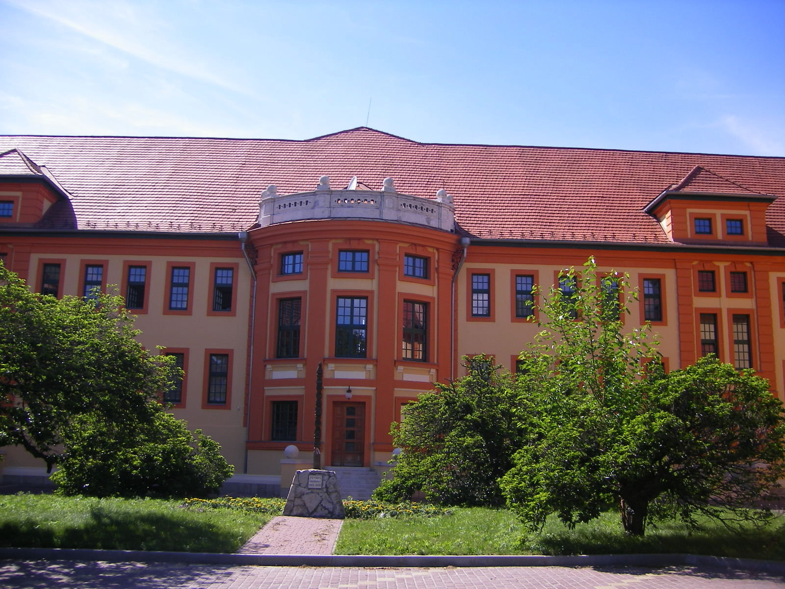 Dél-Komárom - városháza